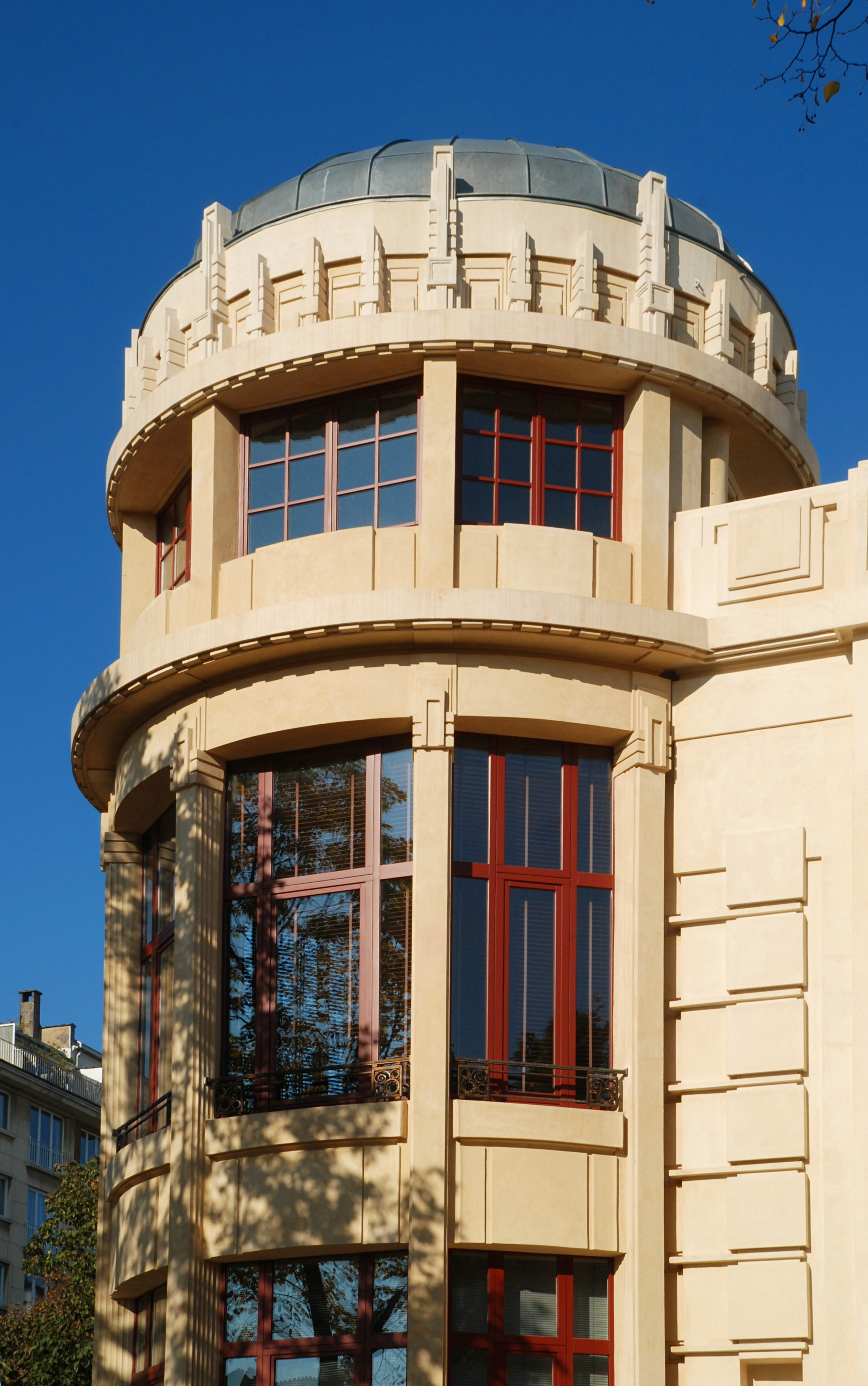 Belgique - Bruxelles - Uccle - Hôtel Haerens (Art déco - Antoine Courtens - 1928)